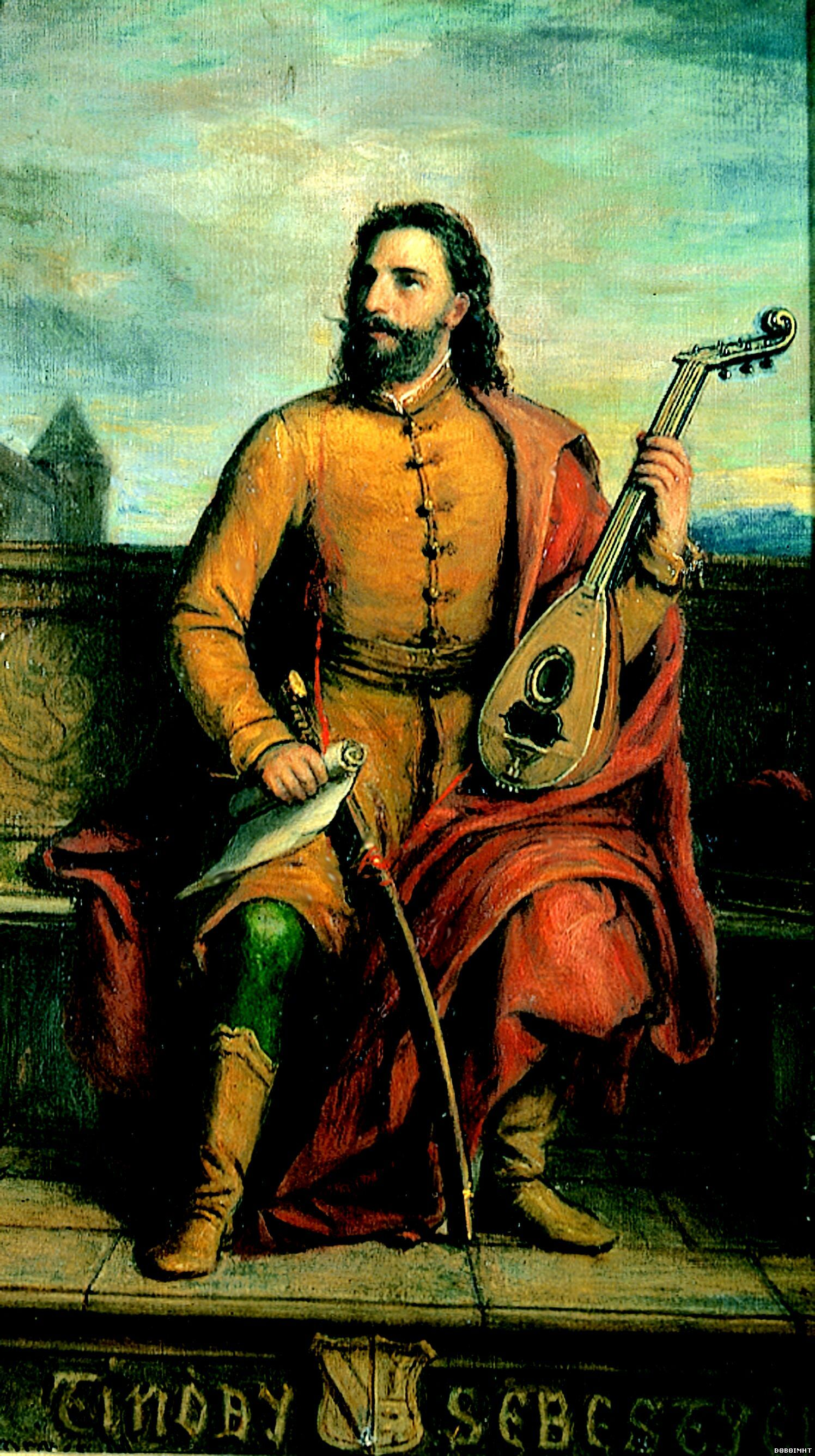 Tinódi_Lantos_Sebestyén (Tinód, 1510 körül – Sárvár, 1556. január 30.) énekszerző, lantos, a 16. századi magyar epikus költészet jelentős képviselője.